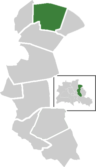 Lage des Ortsteil Wartenberg im Berliner Bezirk Lichtenberg